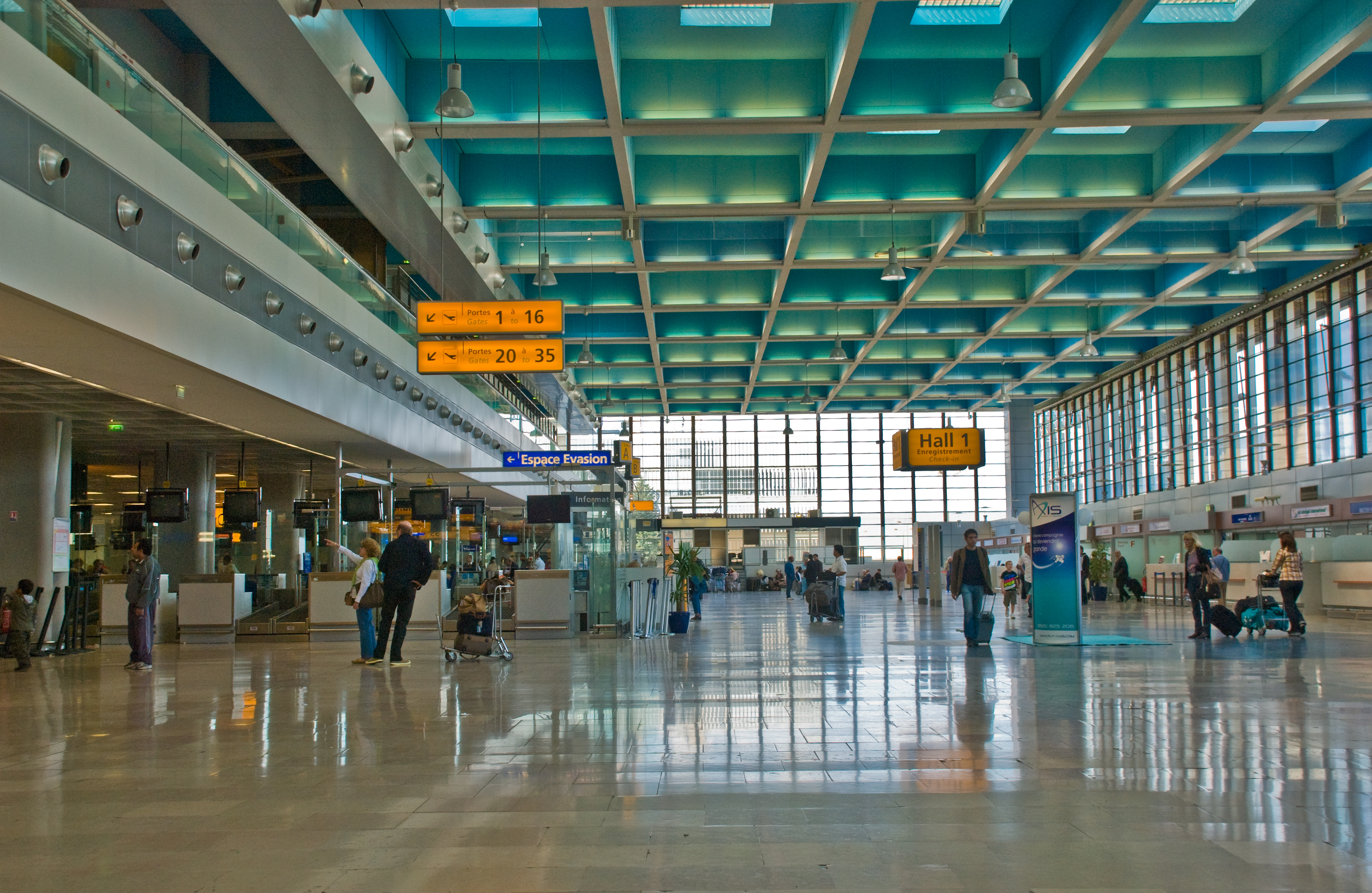 Le hall 1 à l'aéroport de Marseille Provence.